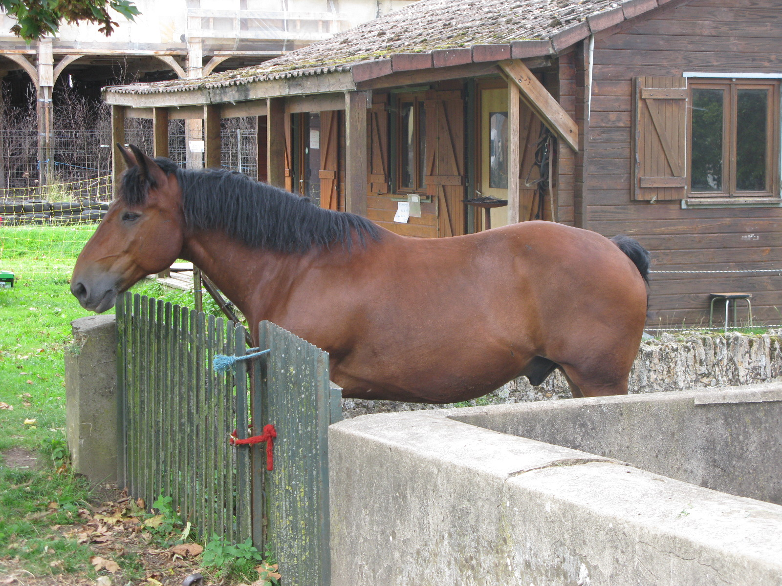 Cheval de trait (equus ferus caballus), bergerie nationale de Rambouillet.